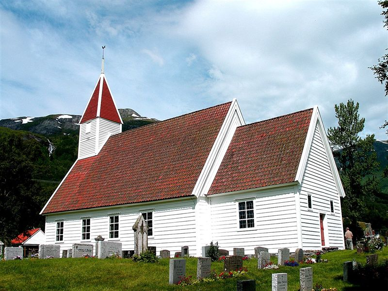 Ålhus kyrka i Norge. Ålhus kirke